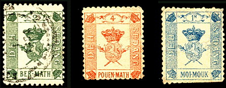 "Марки" виртуального государства Седанг